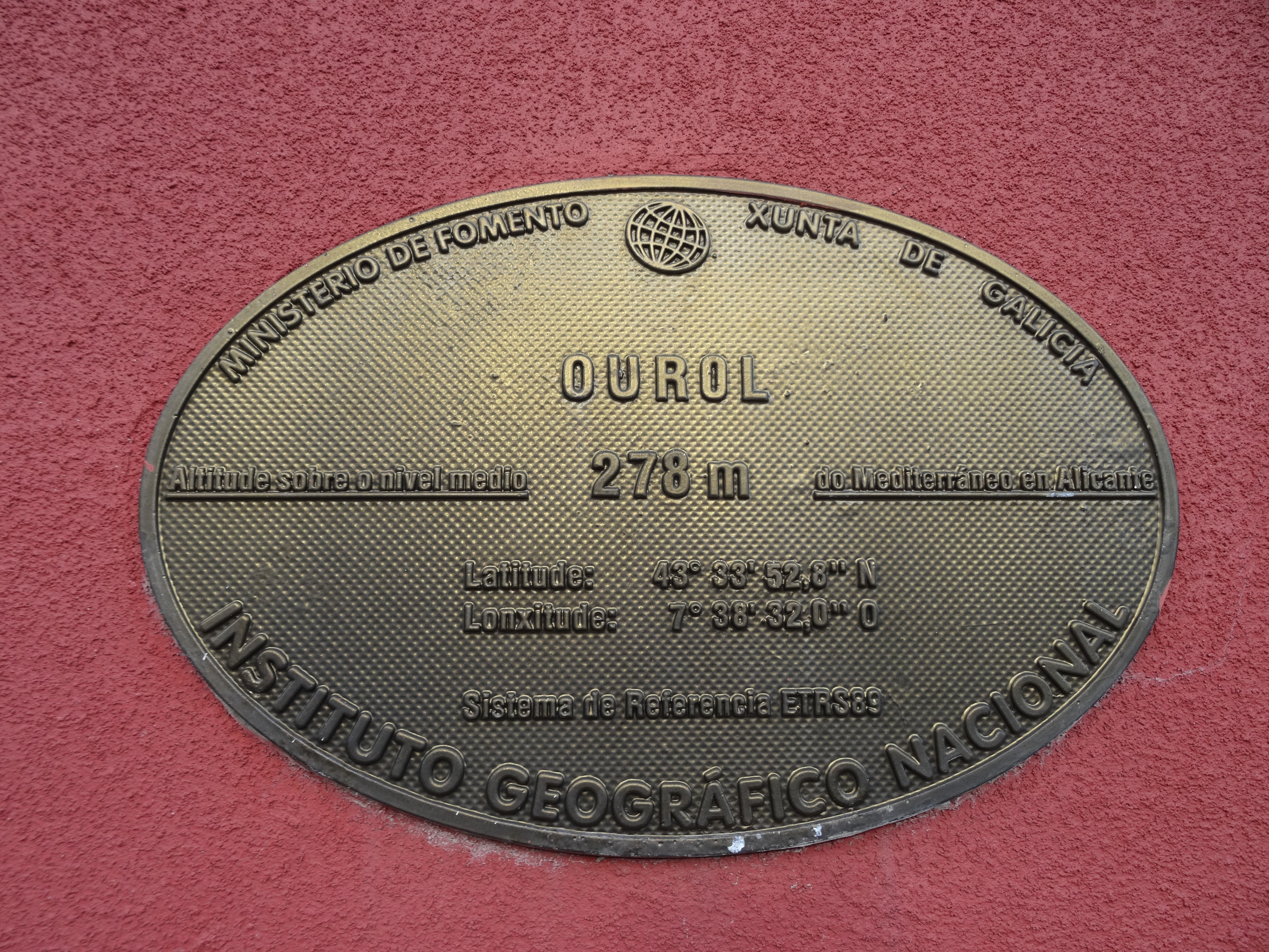 Ver título.